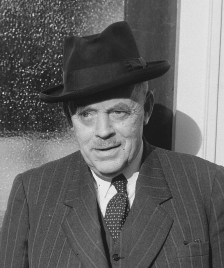 Burgemeester Jhr.mr. J. Schuurbeque Boeye (1891-1955) van Zierikzee